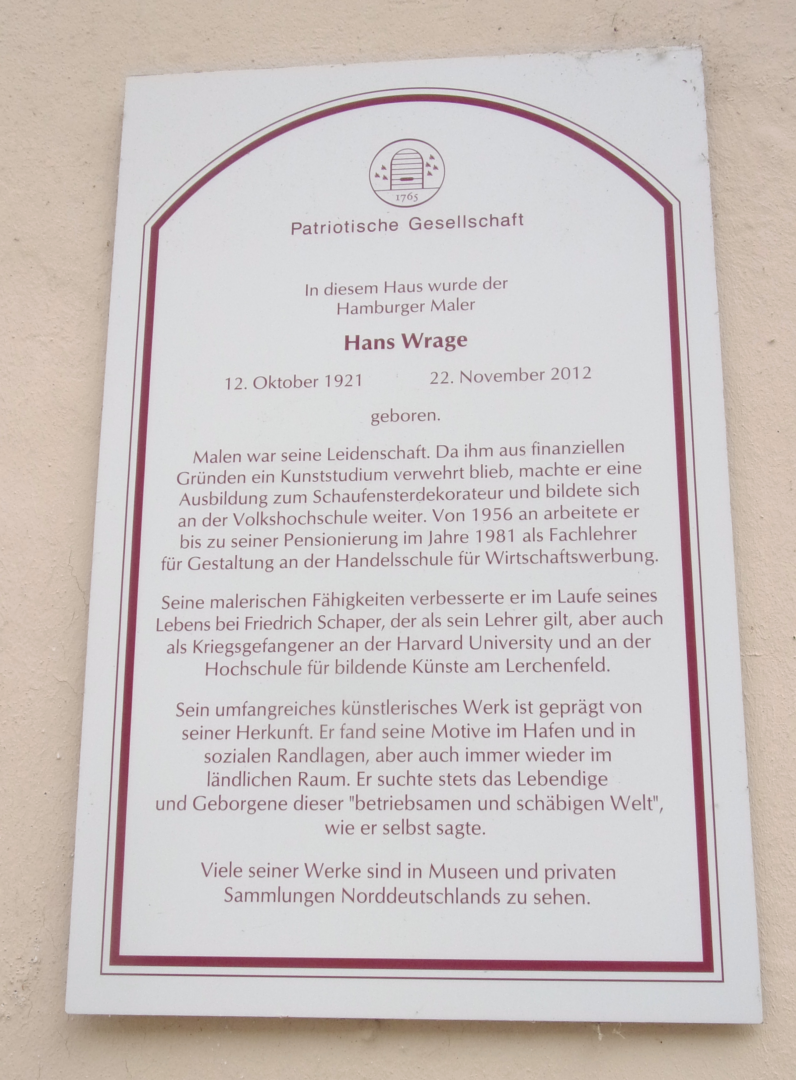 Tafel der Patriotischen Gesellschaft für den Hamburger Maler Hans Wrage (1921-2012). Die Tafel befindet sich an seinem Geburtshaus in der Zeughausstraße 44 in der Hamburger Neustadt. Hans Wrage war ein bedeutender Künstler und malte überwiegend Motive seiner Heimatstadt Hamburg aber auch aus dem Norden. Bilder von ihm finden sich unter dem folgenden Link